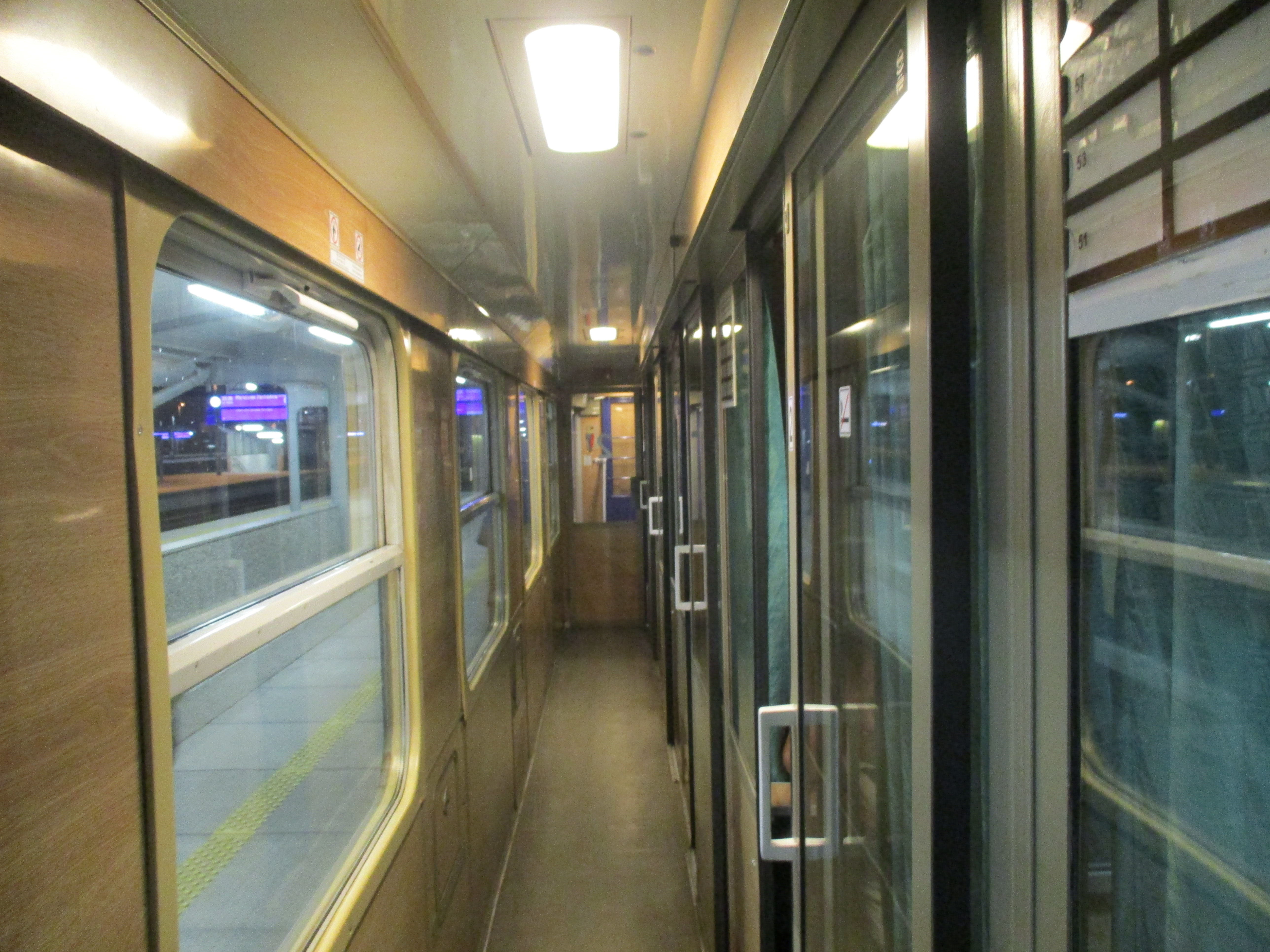 Wnętrze polskiego wagonu 2-giej klasy typu 111Aw